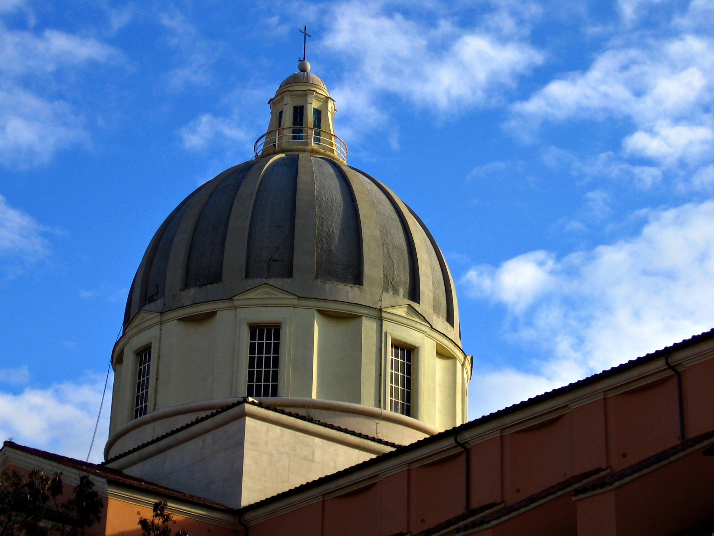 Cupola di S.Francesco Saverio alla Garbatella